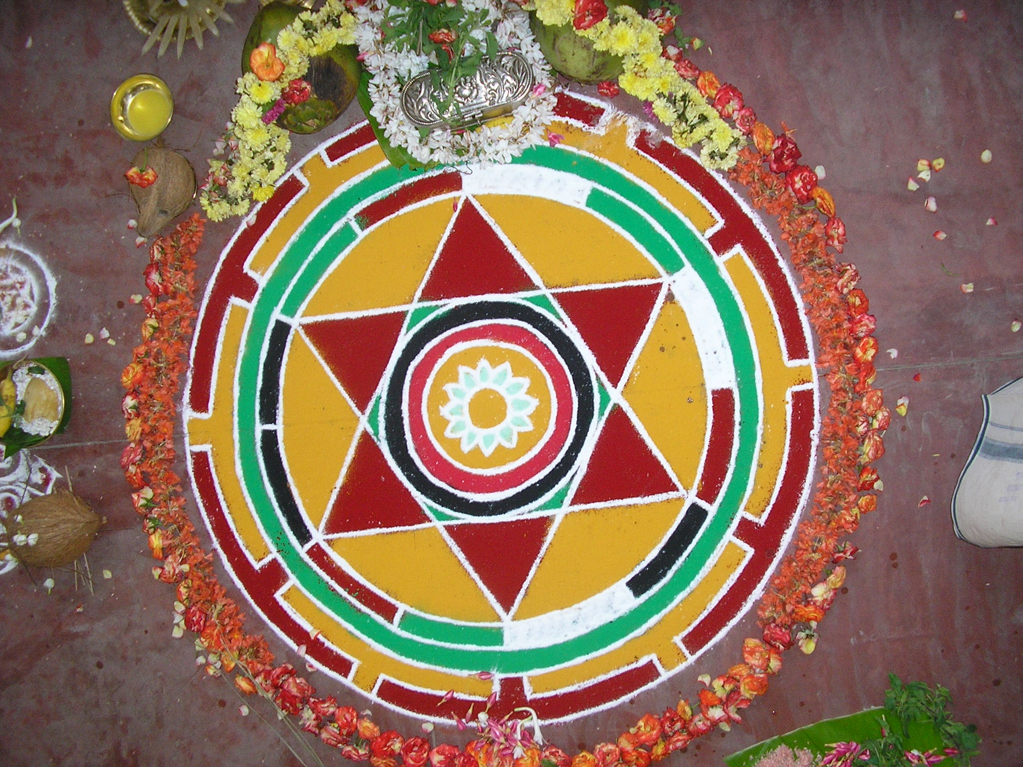 Mandala